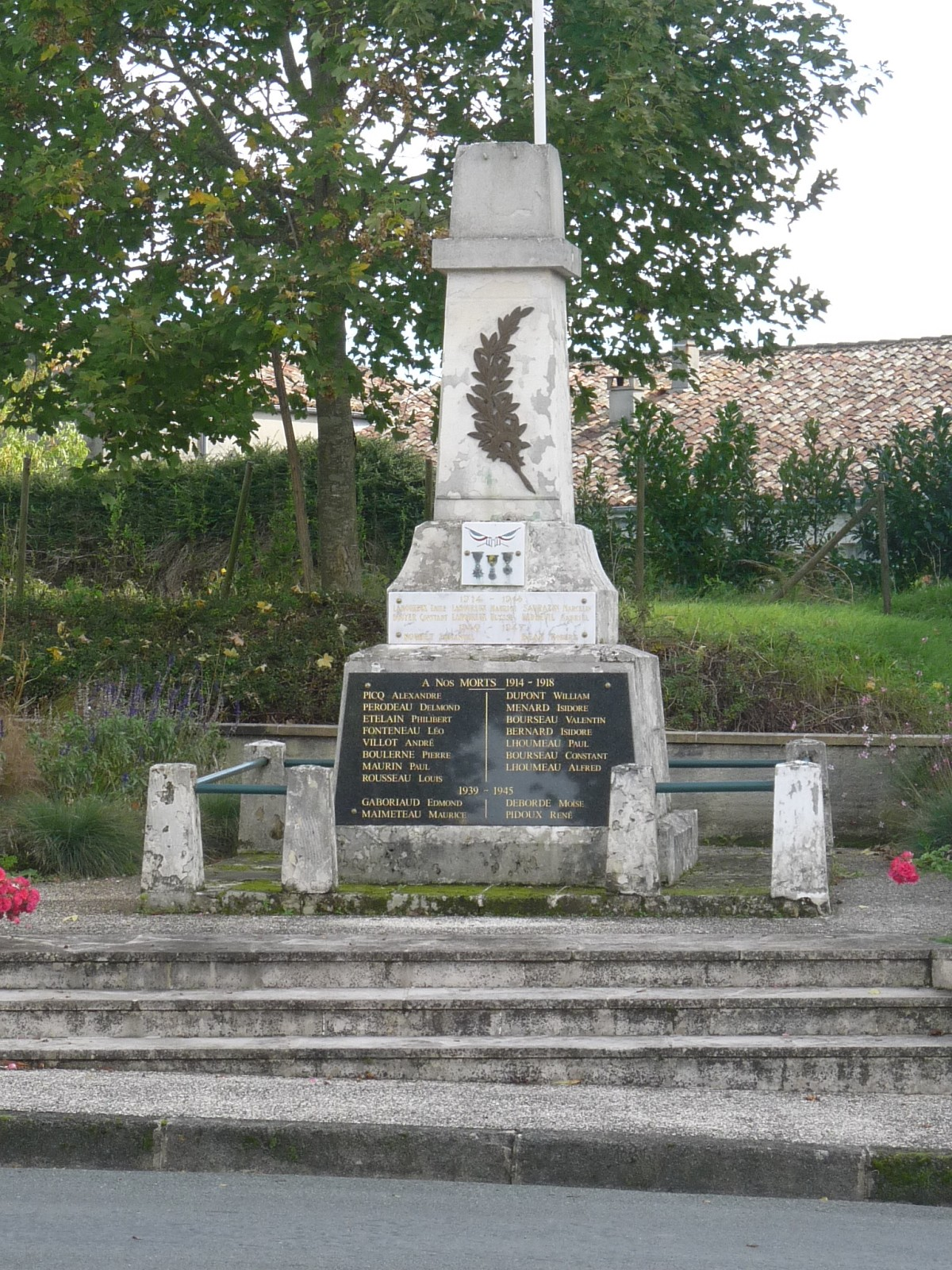 Monument aux morts, Tugéras, Charente-Maritime, France